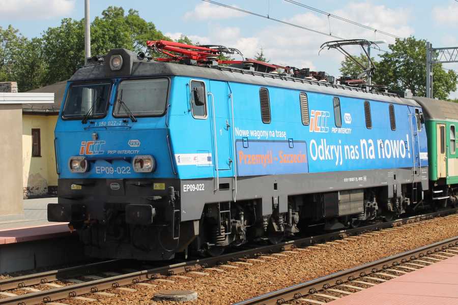 Lokomotywa elektryczna EP09-022 należąca do PKP Intercity w okleinie „Odkryj nas na nowo!” wjeżdża na stację Ciechanów.